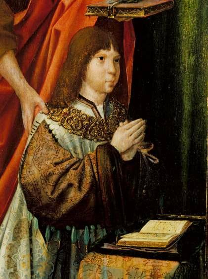 De Triptico dos Infantes